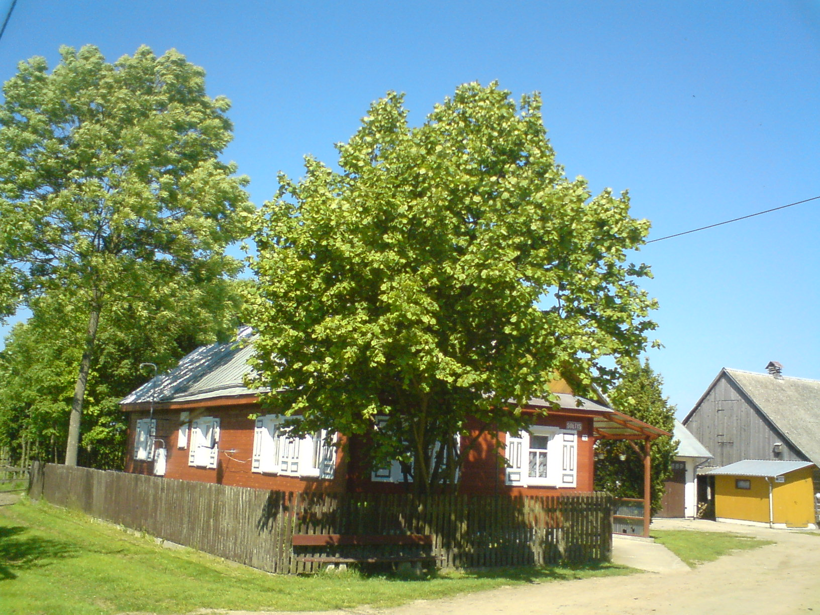 Dom w Radźkach